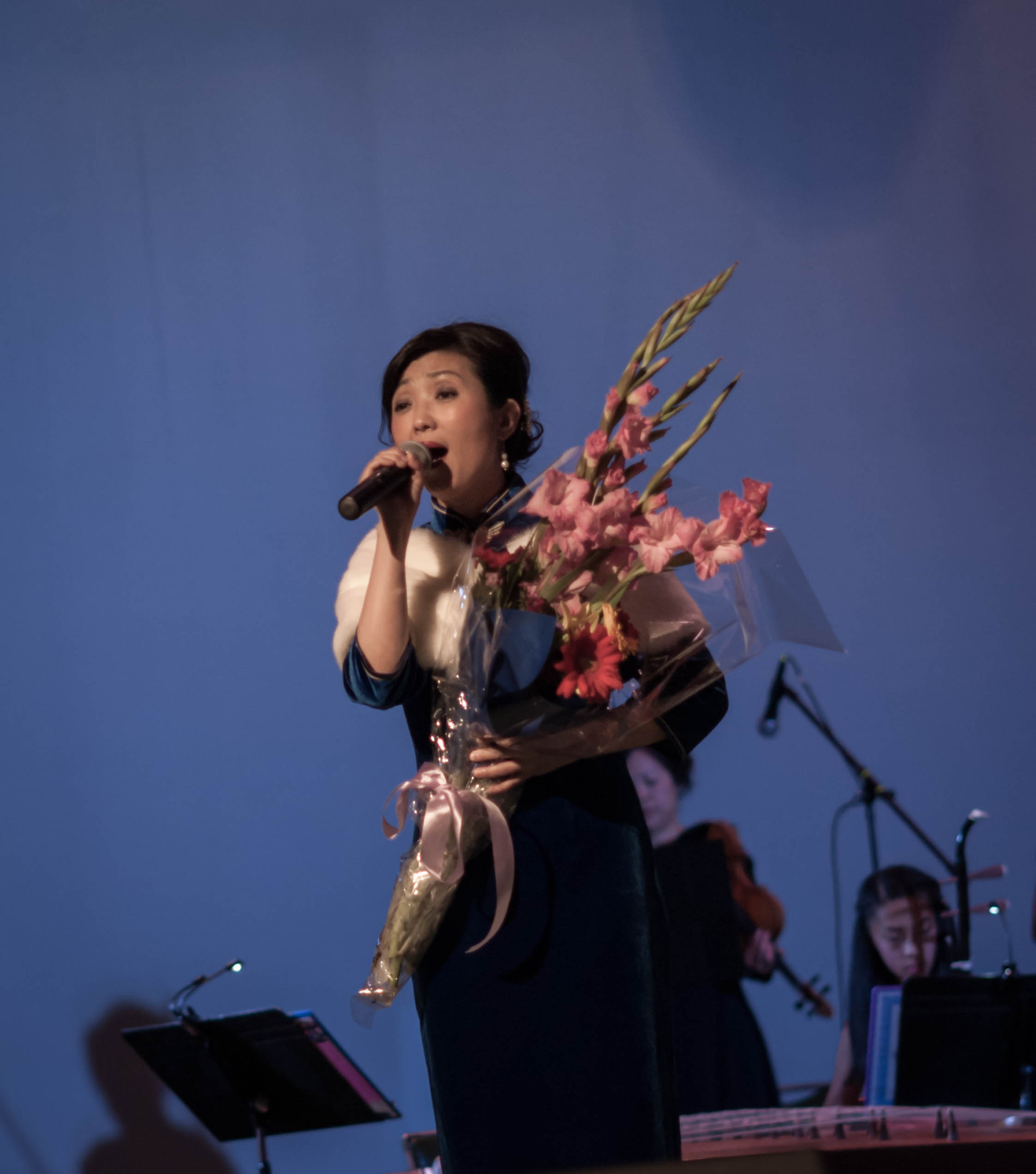 梅楣在演唱會上